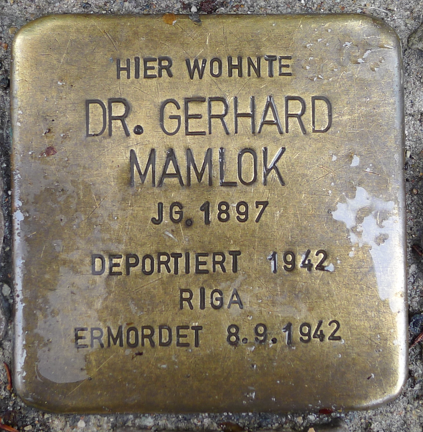 Stolperstein für Gerhard Mamlok, Lange Straße 68, Greifswald